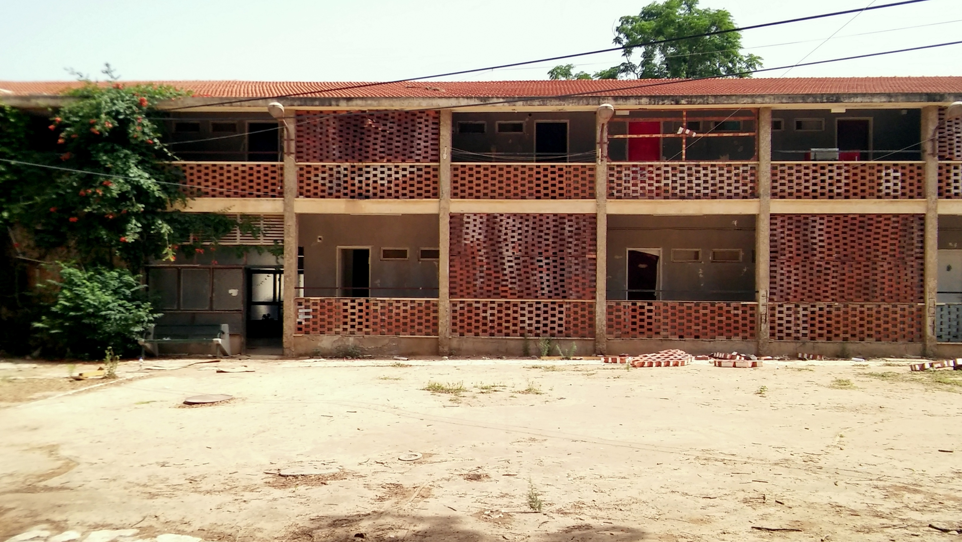 בית ישע גבעת ברנר